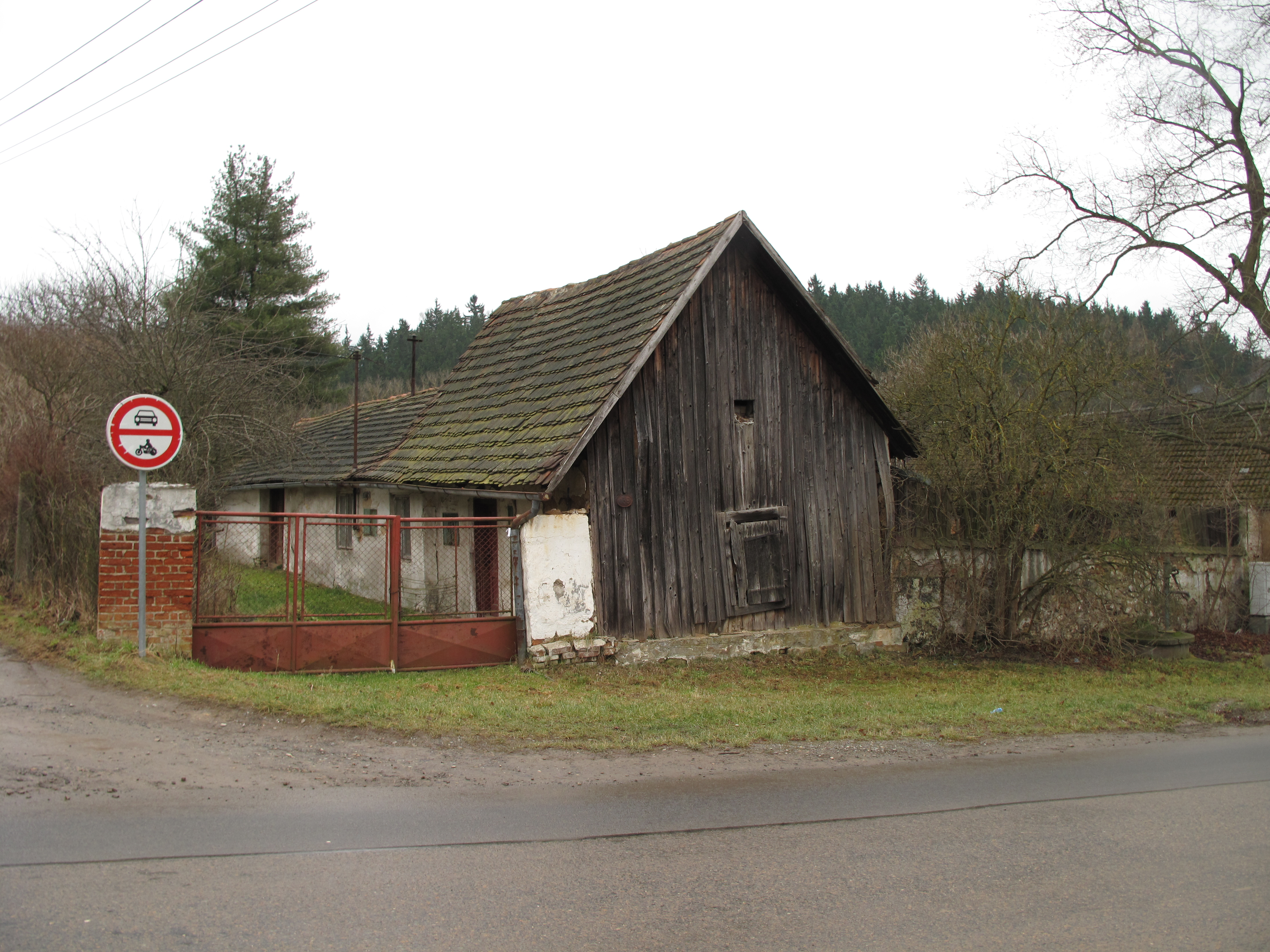 Dřevěný štít v Sedleci (Starý Plzenec). Okres Plzeň-město, Česká republika.